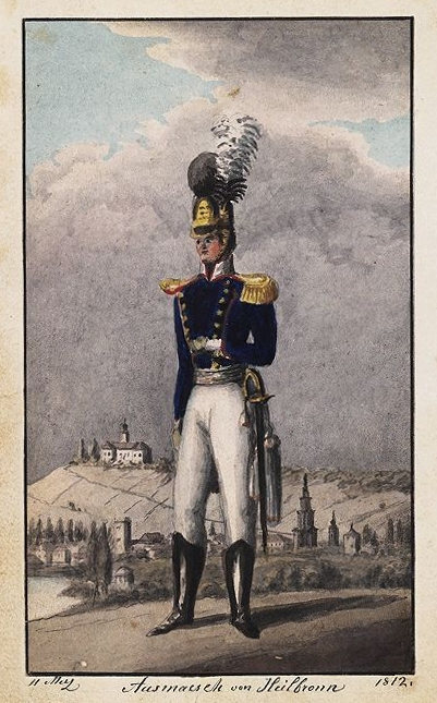 Christian von Martens in seiner Uniform